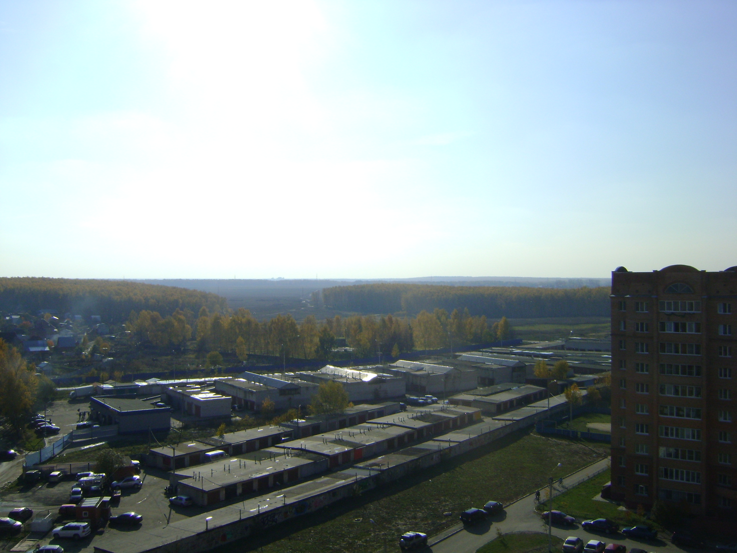 Домодедово,вид на лес